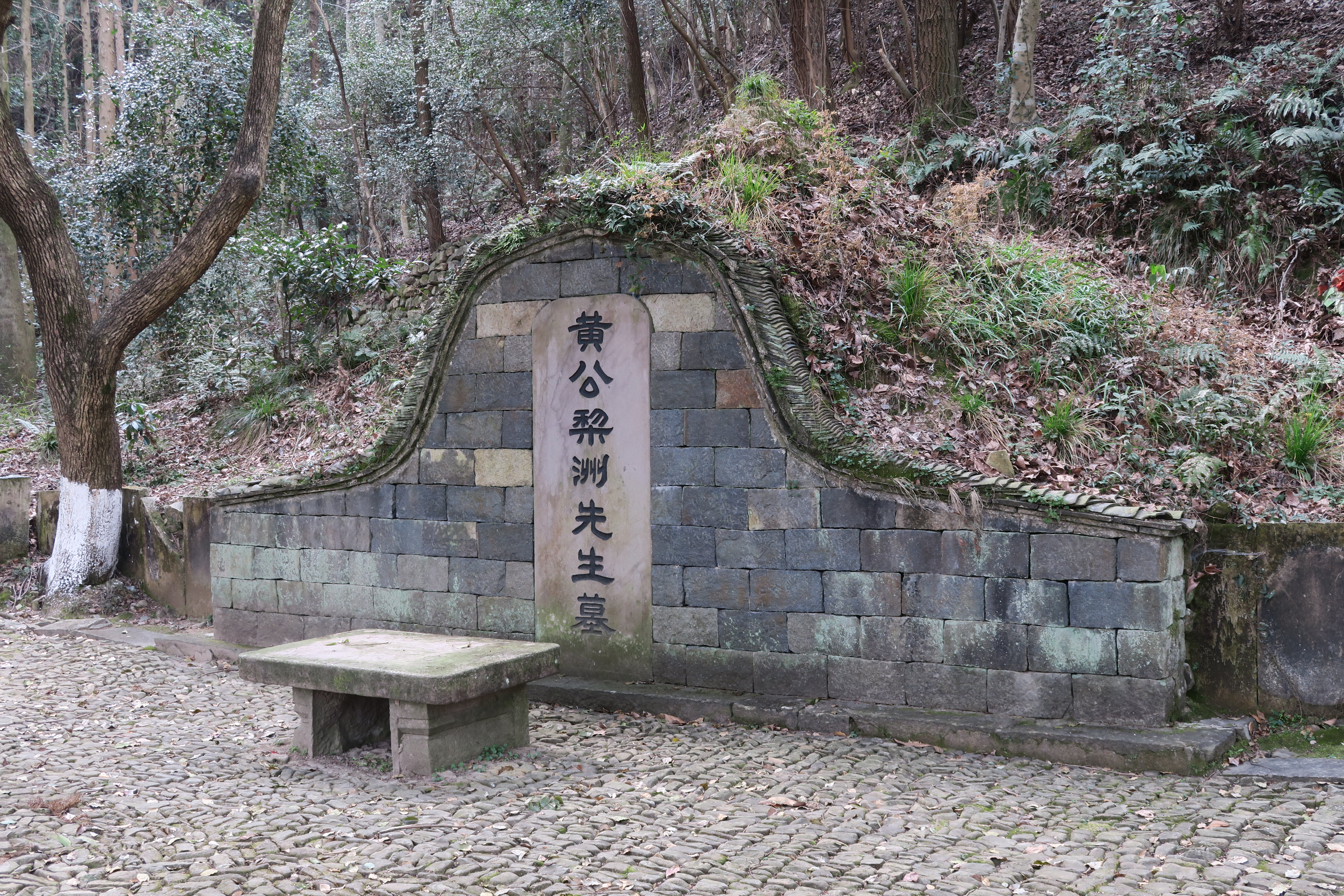 余姚黄宗羲墓